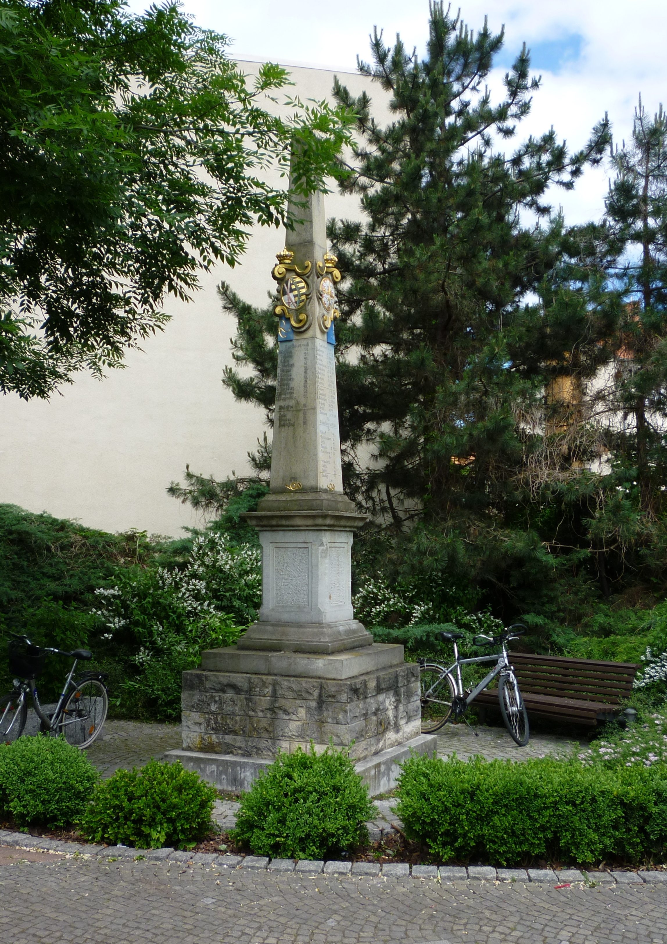 Kursächsische Postmeilensäule in Guben